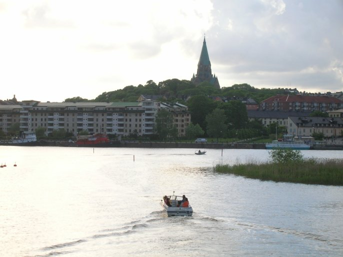 Hammarby Sjö och Sofia kyrka, Stockholm, Sweden